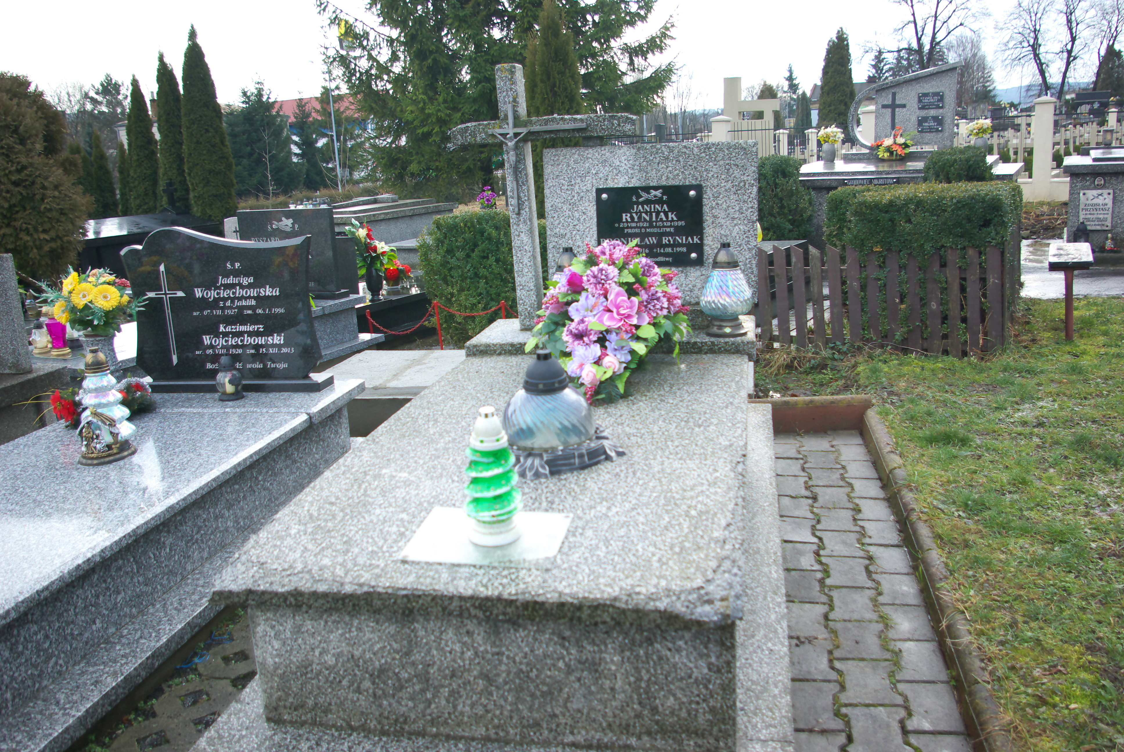 Grobowiec Bronisława i Janiny Ryniak w części „Matejki Stary” Cmentarza Centralnego w Sanoku.